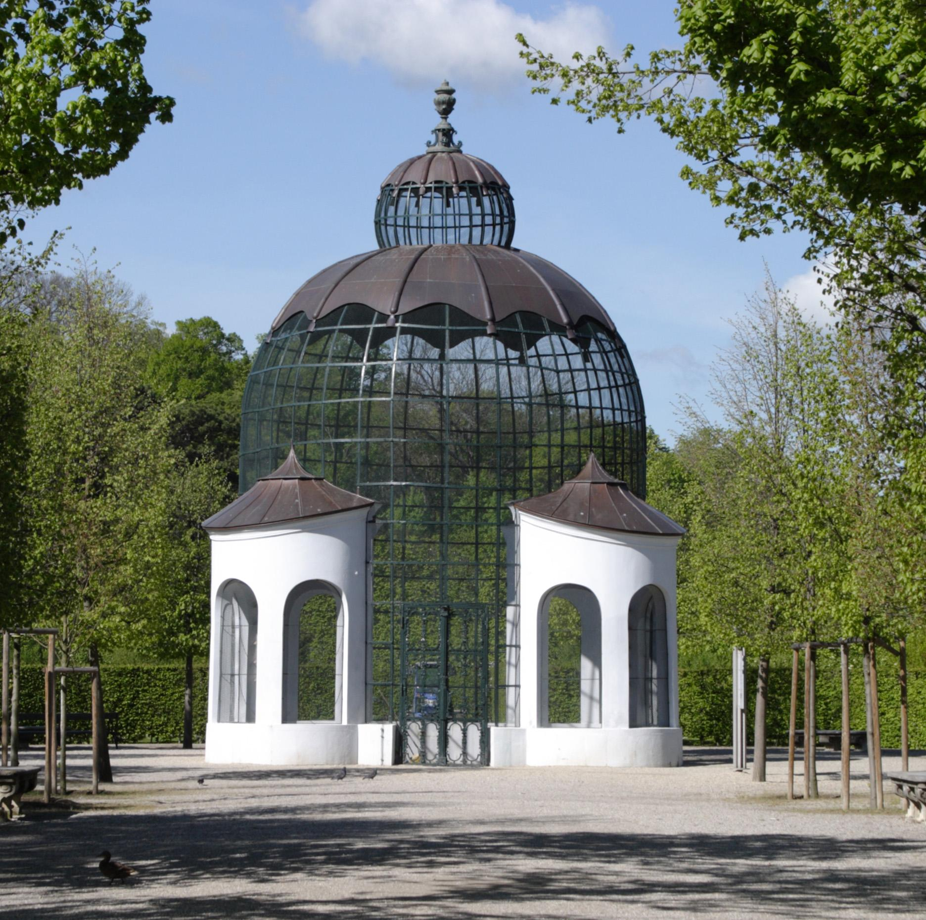 Columbary or dovecote